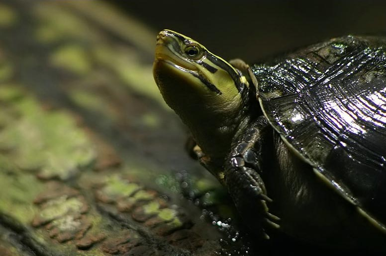 Cuora amboinensis - Amboina-Scharnierschildkröte ; Aufgenommen mit einer Canon EOS 300D im Reptilium Landau. ; Fotograf/Quelle: Petra Karstedt / ; Motiv: Amboina Scharnierschildkröte (Cuora amboinensis)